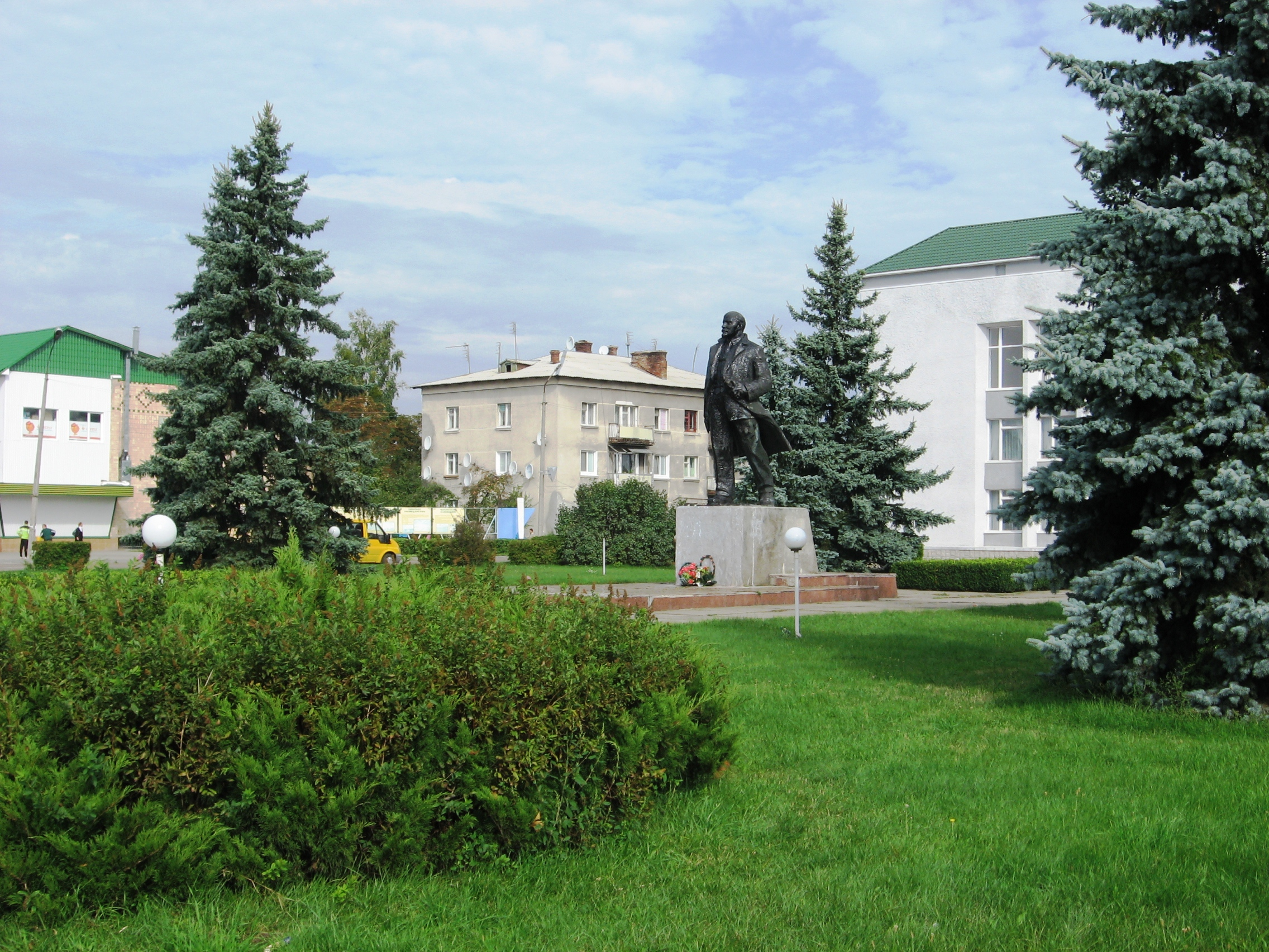 Маневичі. Центральна площа та єдиний на Волині пам'ятник Леніну (2010)